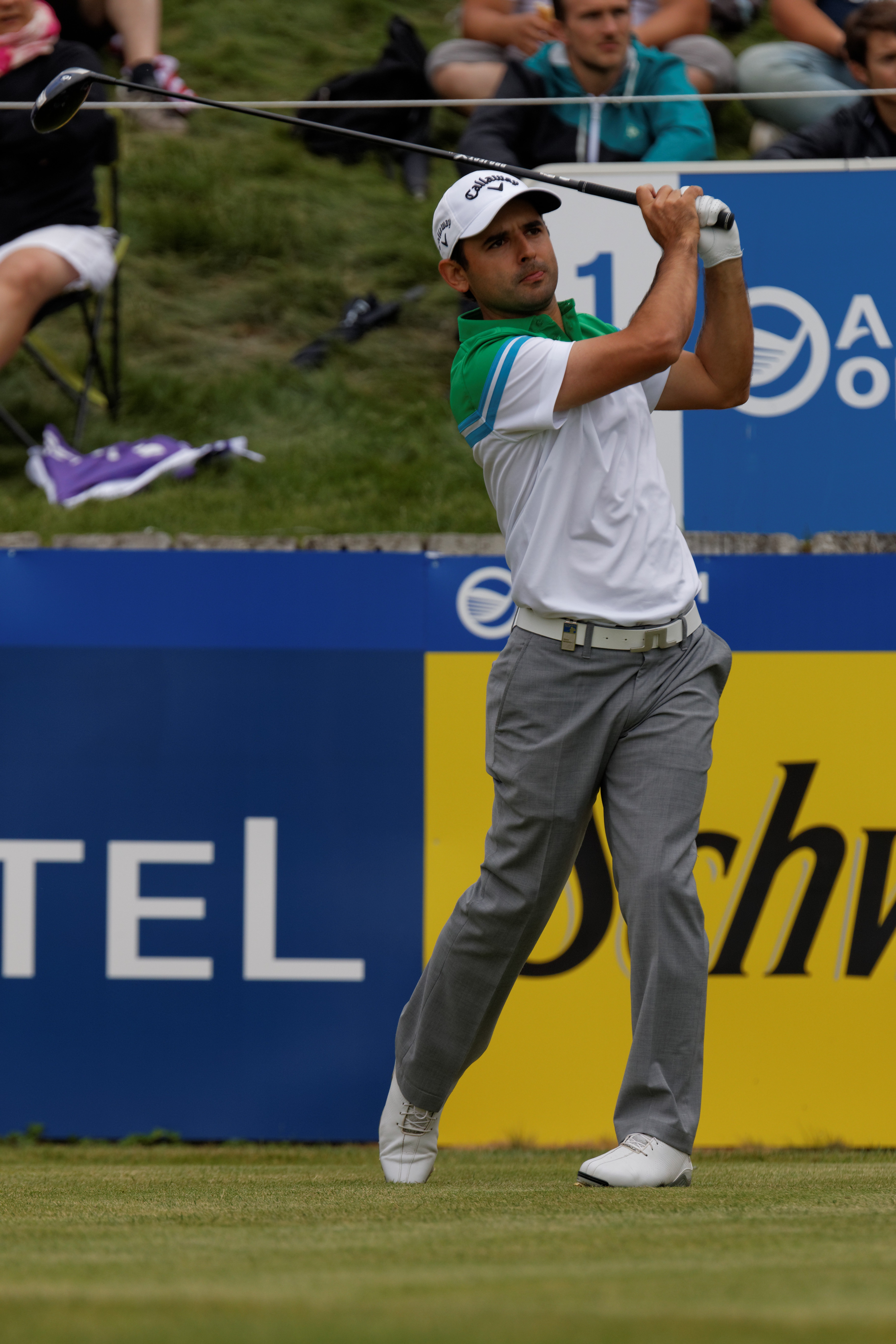 Fabrizio Zanotti lors du second tour de l'Open de France 2014 - Golf National - Saint-Quentin-en-Yvelines (78) - départ du trou n° 1